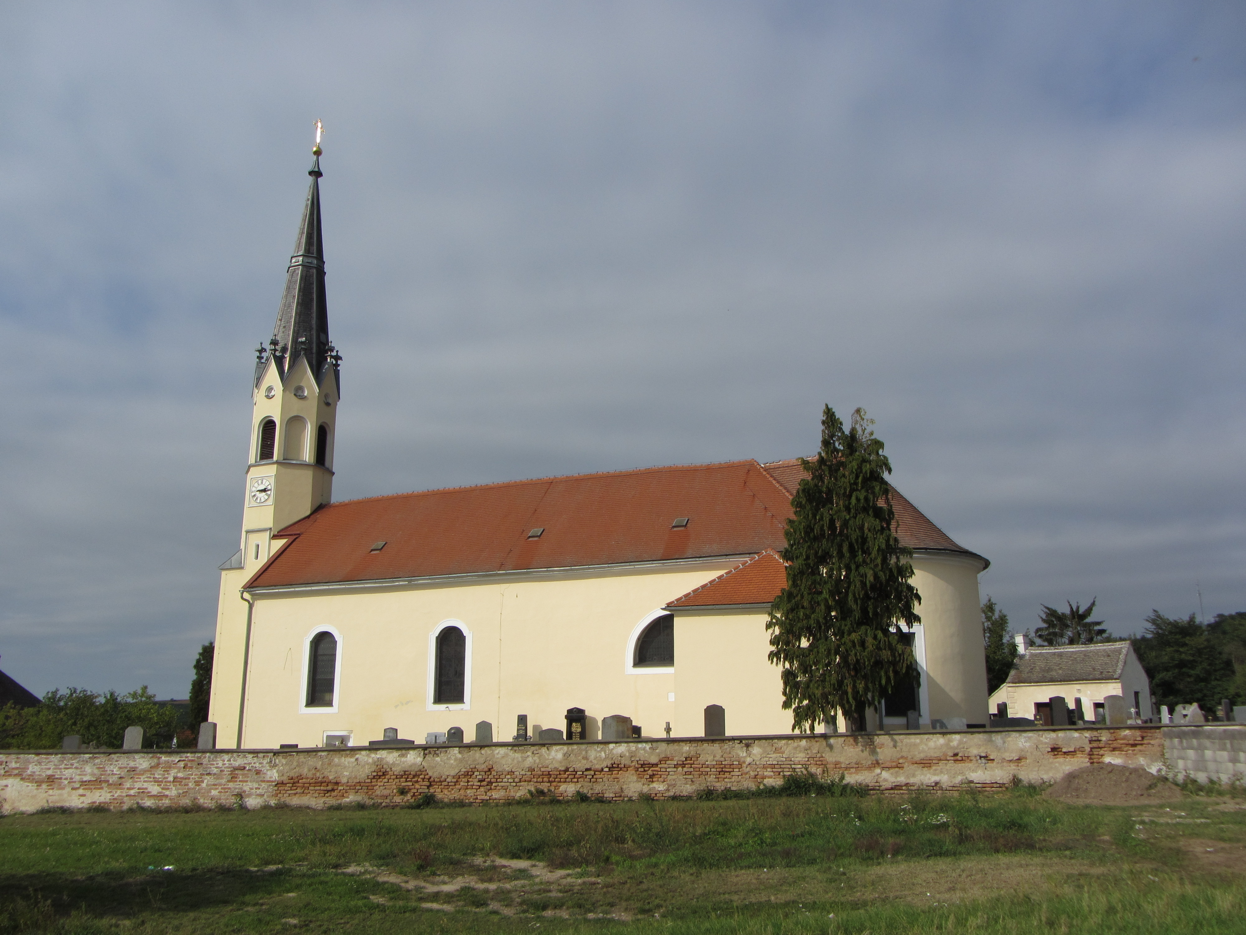 Kath. Pfarrkirche hl. Oswald